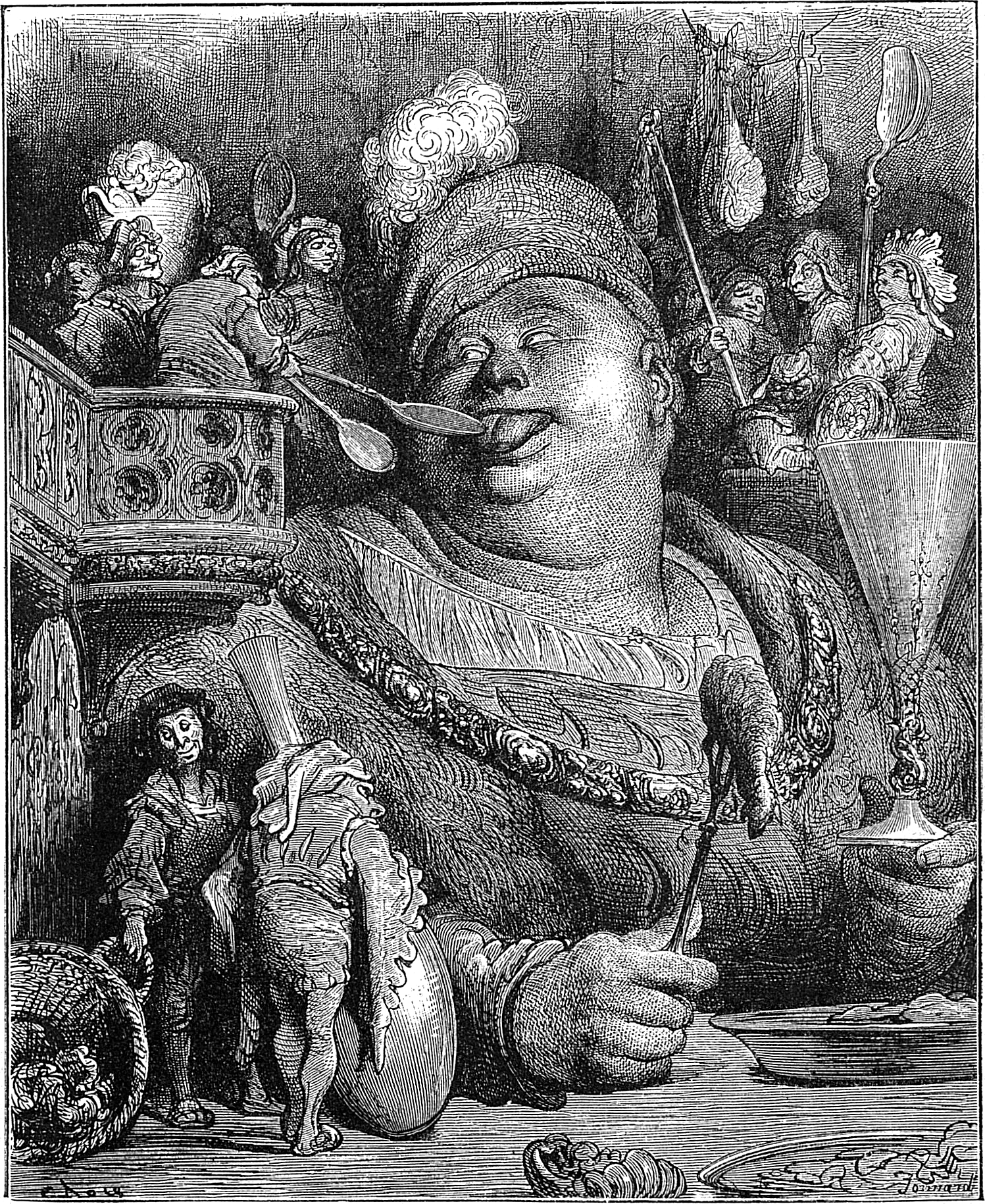 Иллюстрация из книги Гаргантюа, с. 49.